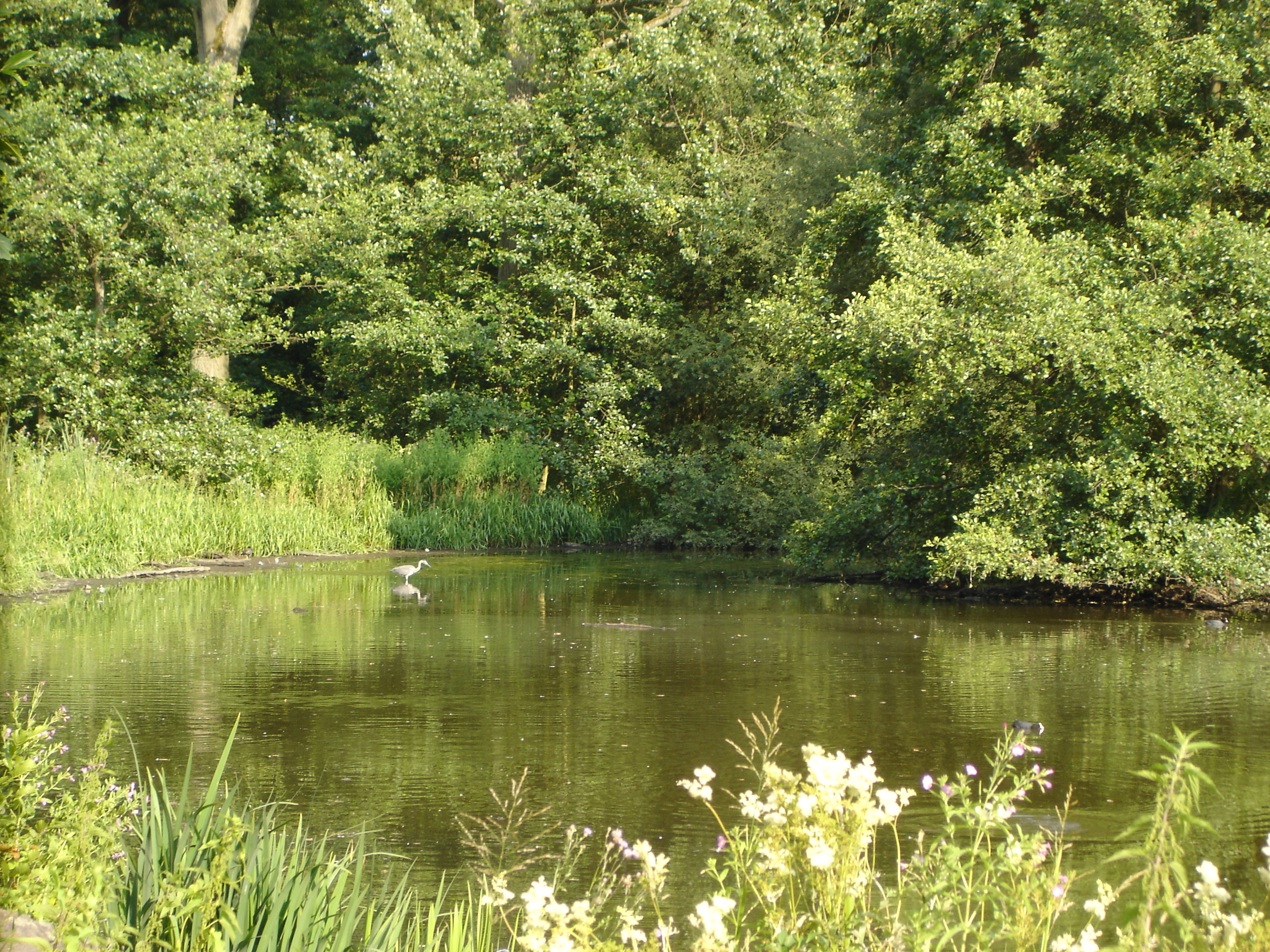 See in Nahaufnahme im Wienburgpark in Münster, Westfalen, Germany